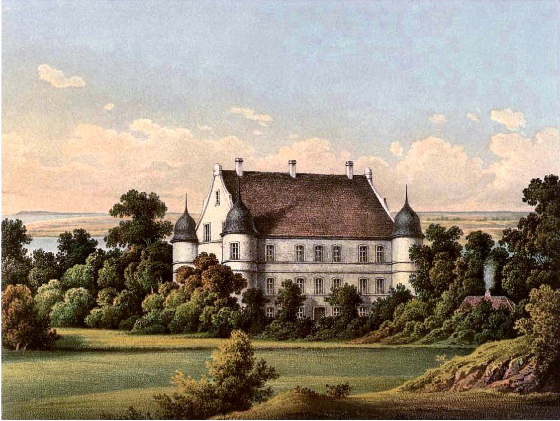 Schloss Spyker, Kreis Rügen, Provinz Pommern